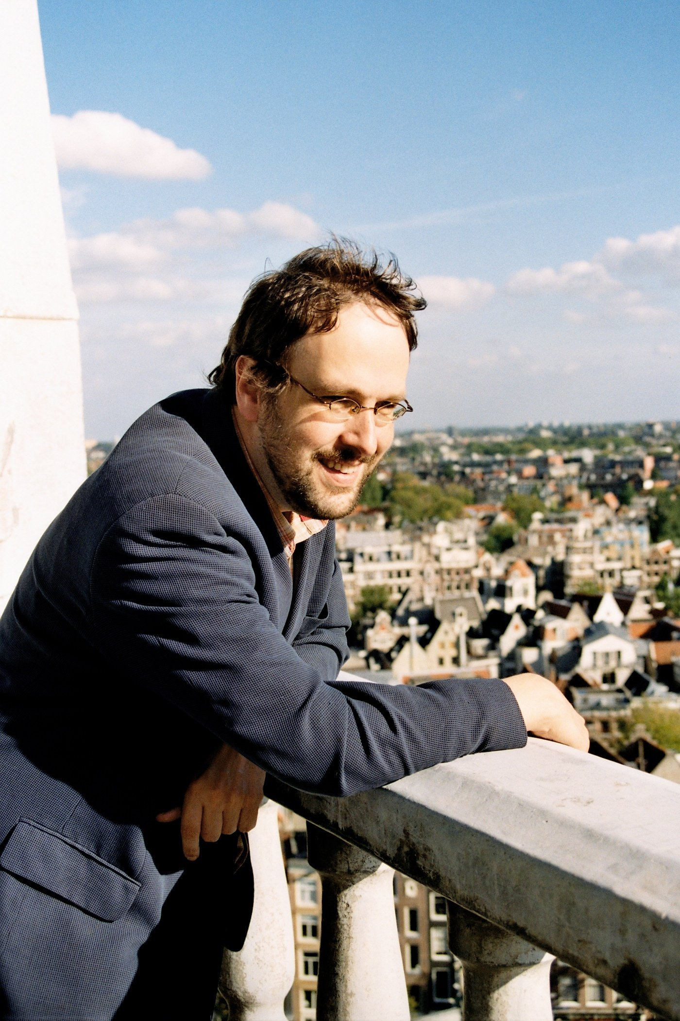 Gideon Bodden, beiaardier